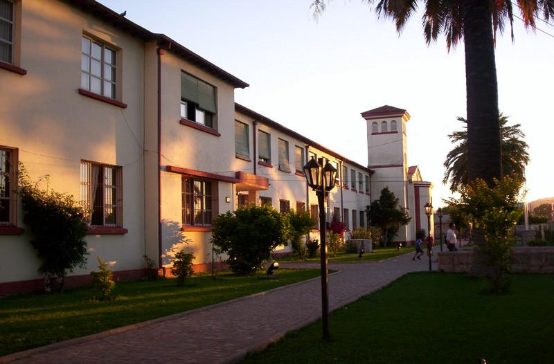 Fachada del IRFE